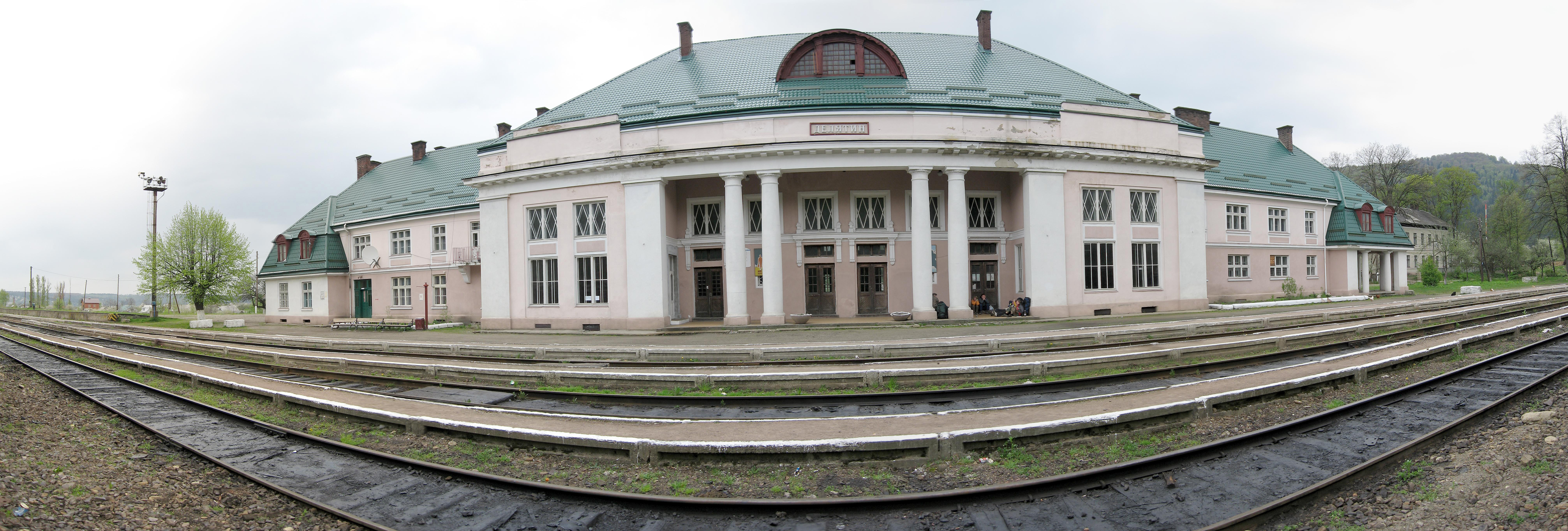 Вокзал в Делятині